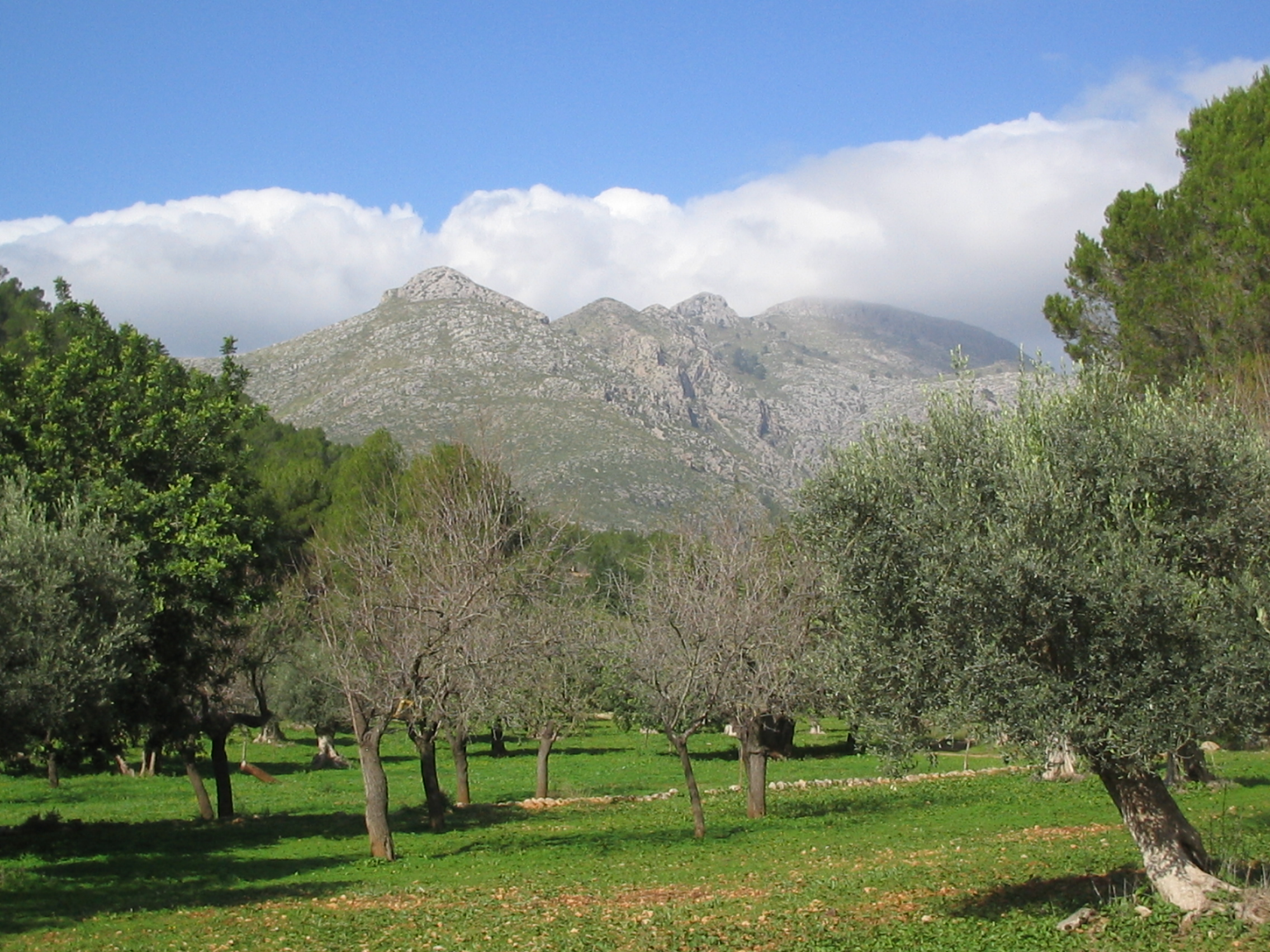 La sierra de tramontana desde las afueras de Calviá en Mallorca.